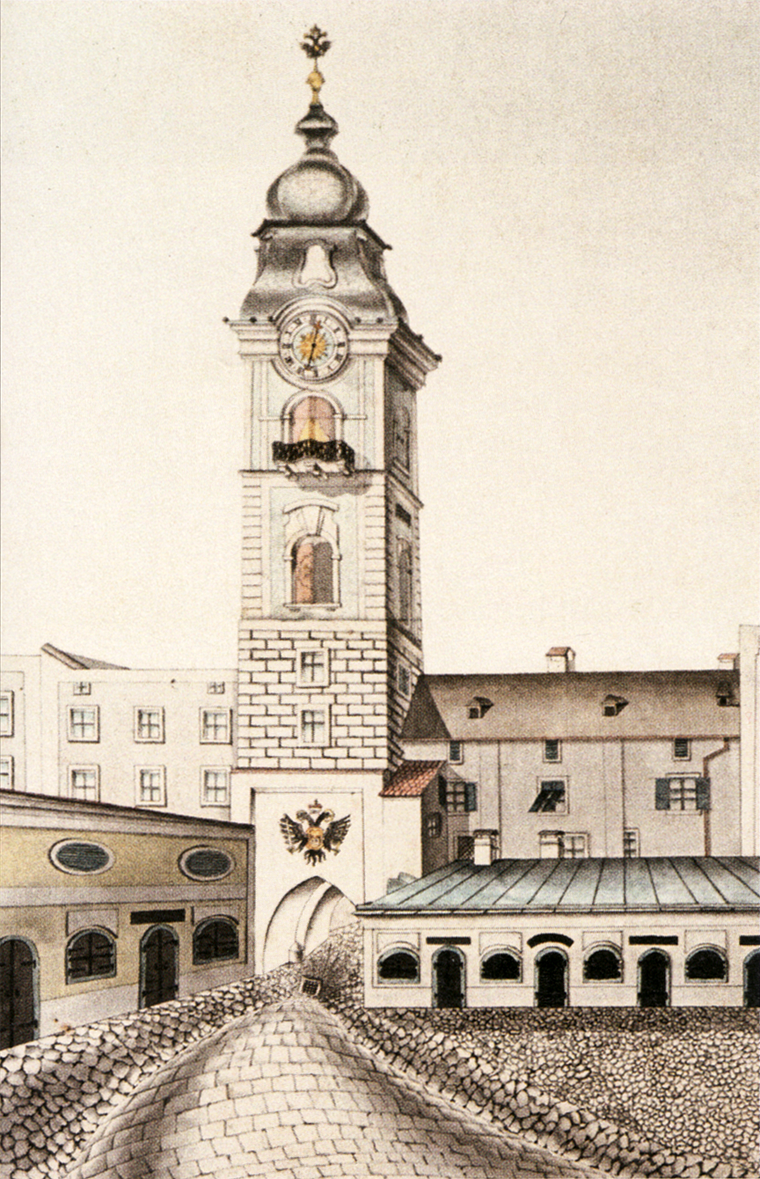 Der Linzer Schmidtorturm vor seiner Demolierung im Mai 1828. Aquarellierte Federzeichnung von Franz Laudacher